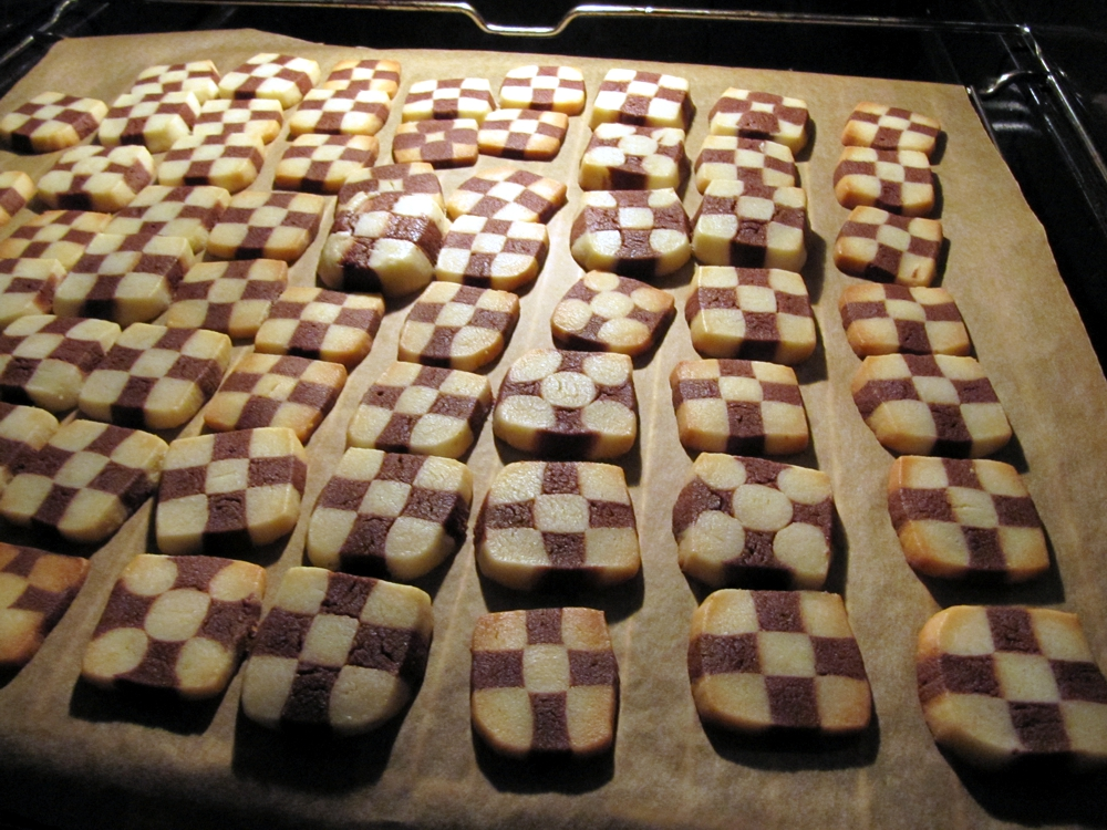 Schwarzweißkekse, selbstgebacken wie bei Oma (typisch für Hamburger Küche als Kekse zu Kaffee und Kuchen)